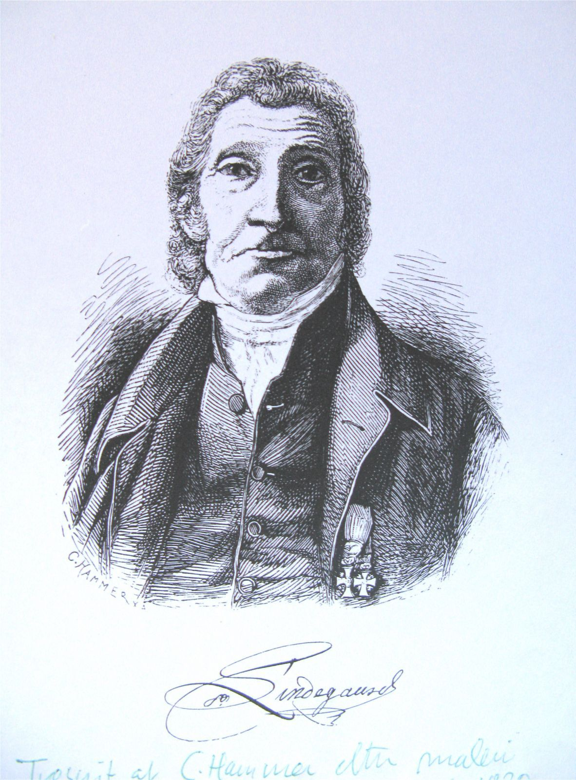 Peter Lindegaard (1758-1832), Danish royal gardener. Xylograph